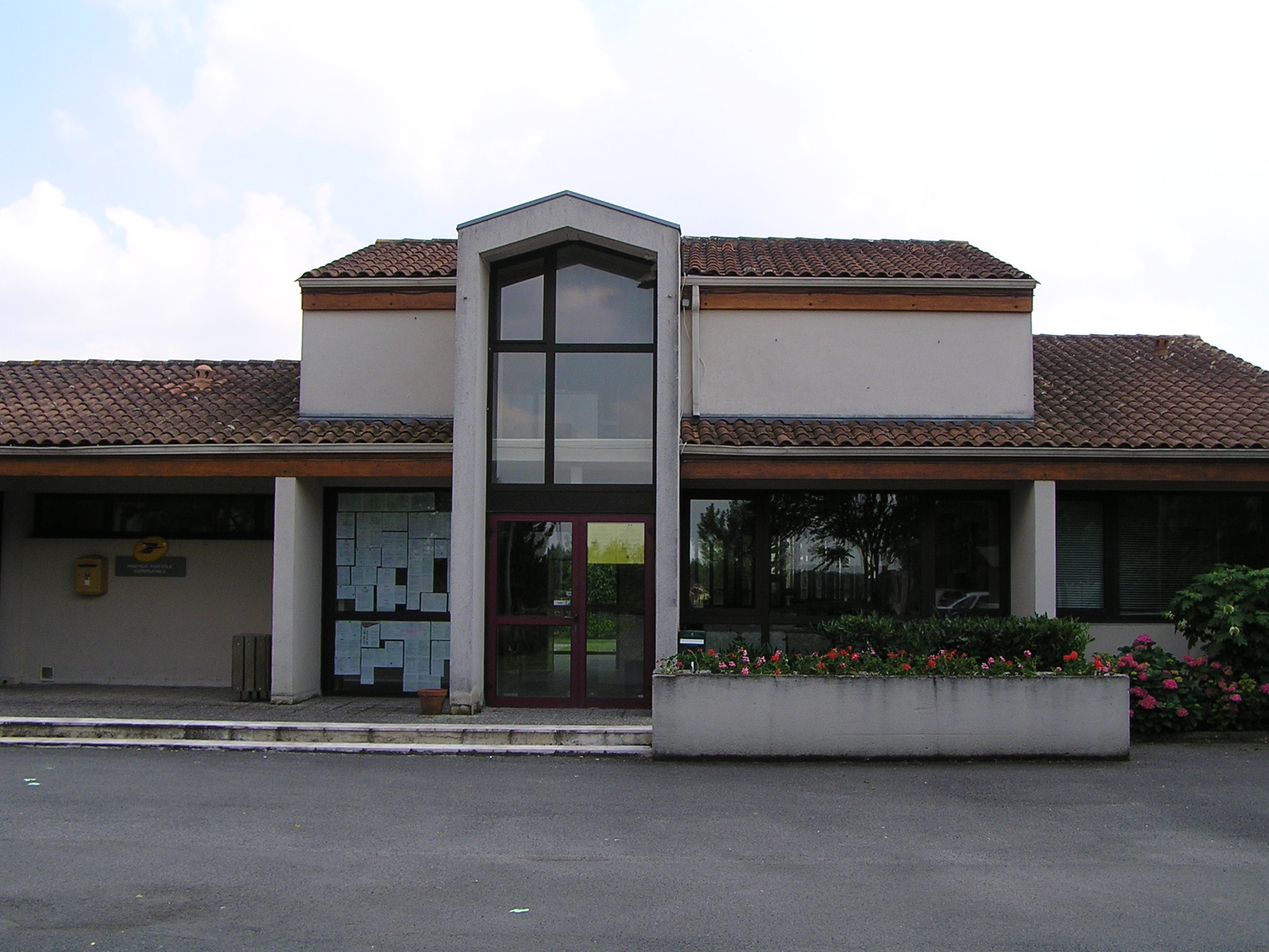 mairie de Merpins